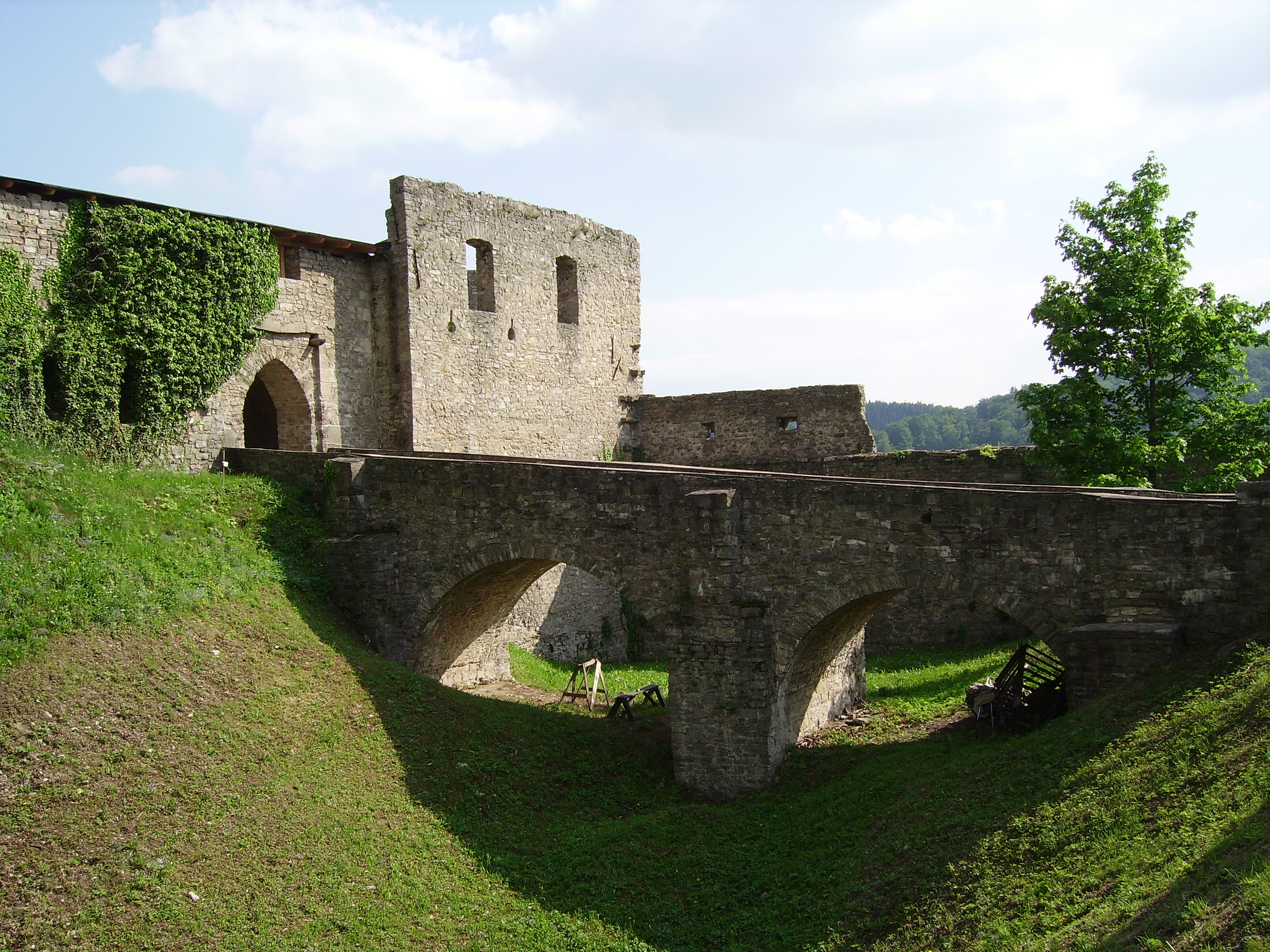 Hukvaldy_Castle09.JPG